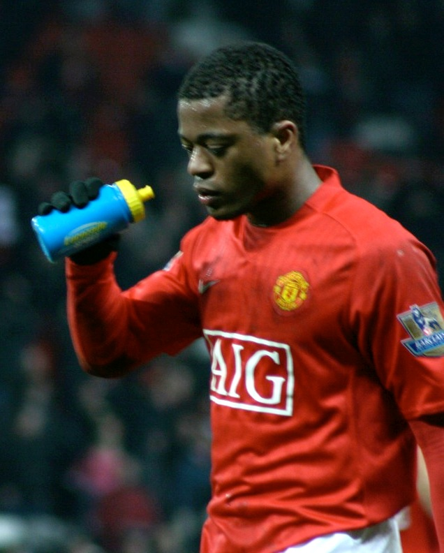 Patrice Evra (Manchester United) face à Arsenal, le 16 février 2008.